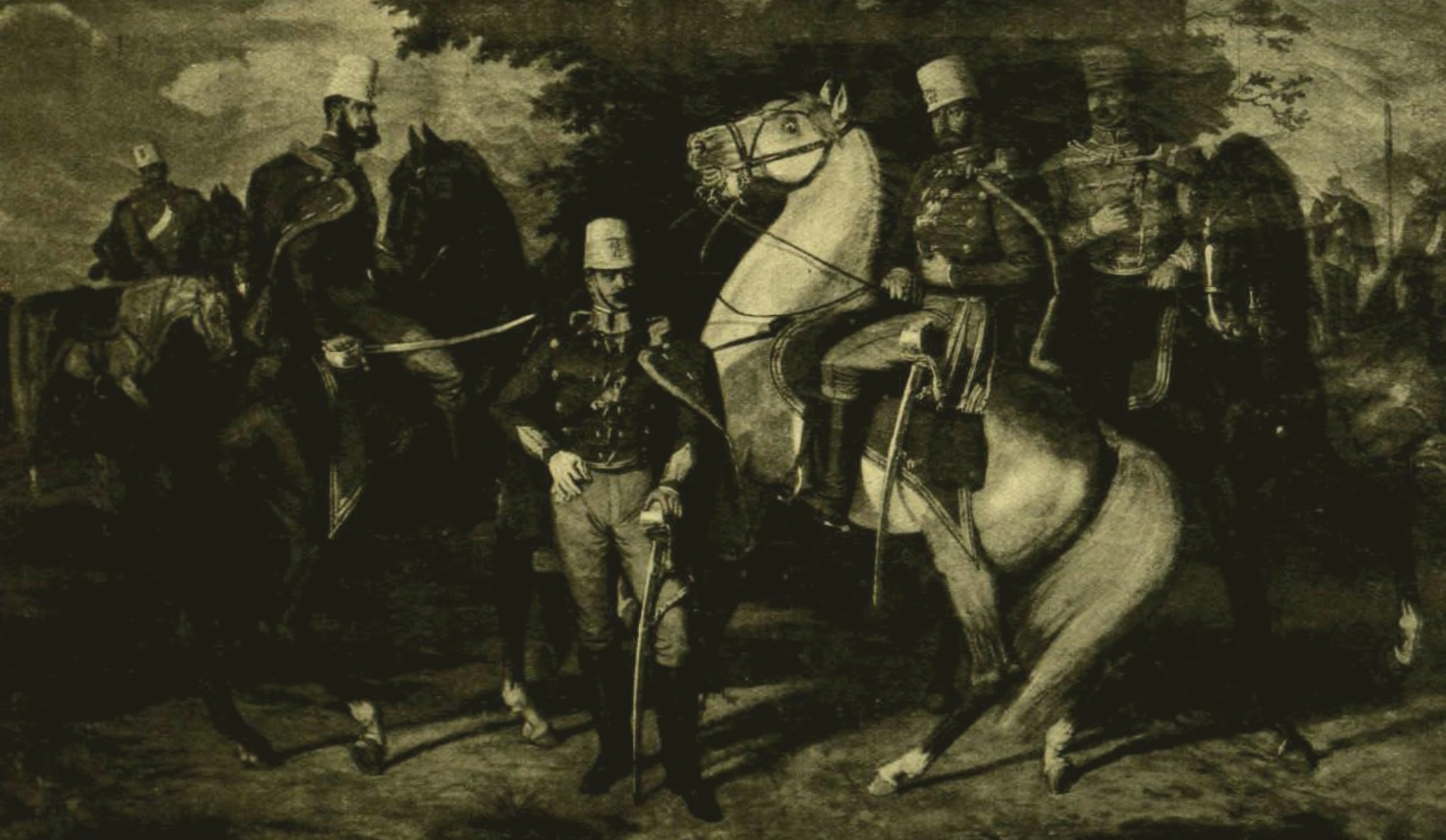 Az 1849-iki Károlyi-huszárezred tisztjei. - Lotz Károly festménye a fóthi kastélyban. Balról jobbra: Gróf Ráday Pál, Báró Podmaniczky Frigyes, Rohonczy Lipót, Gróf Almássy Dénes, Gróf Bethlen József